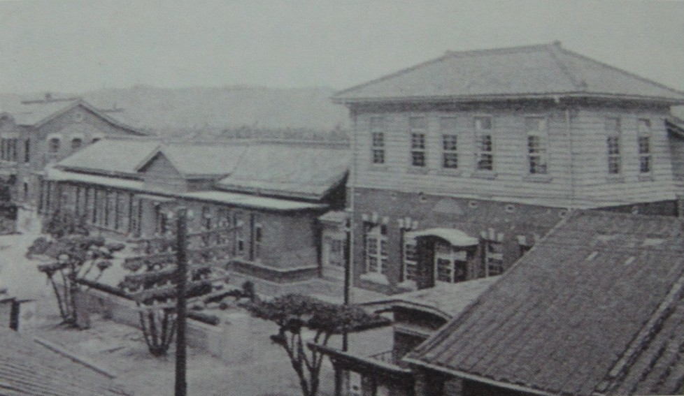 中文（台灣）: 新莊郡役所。